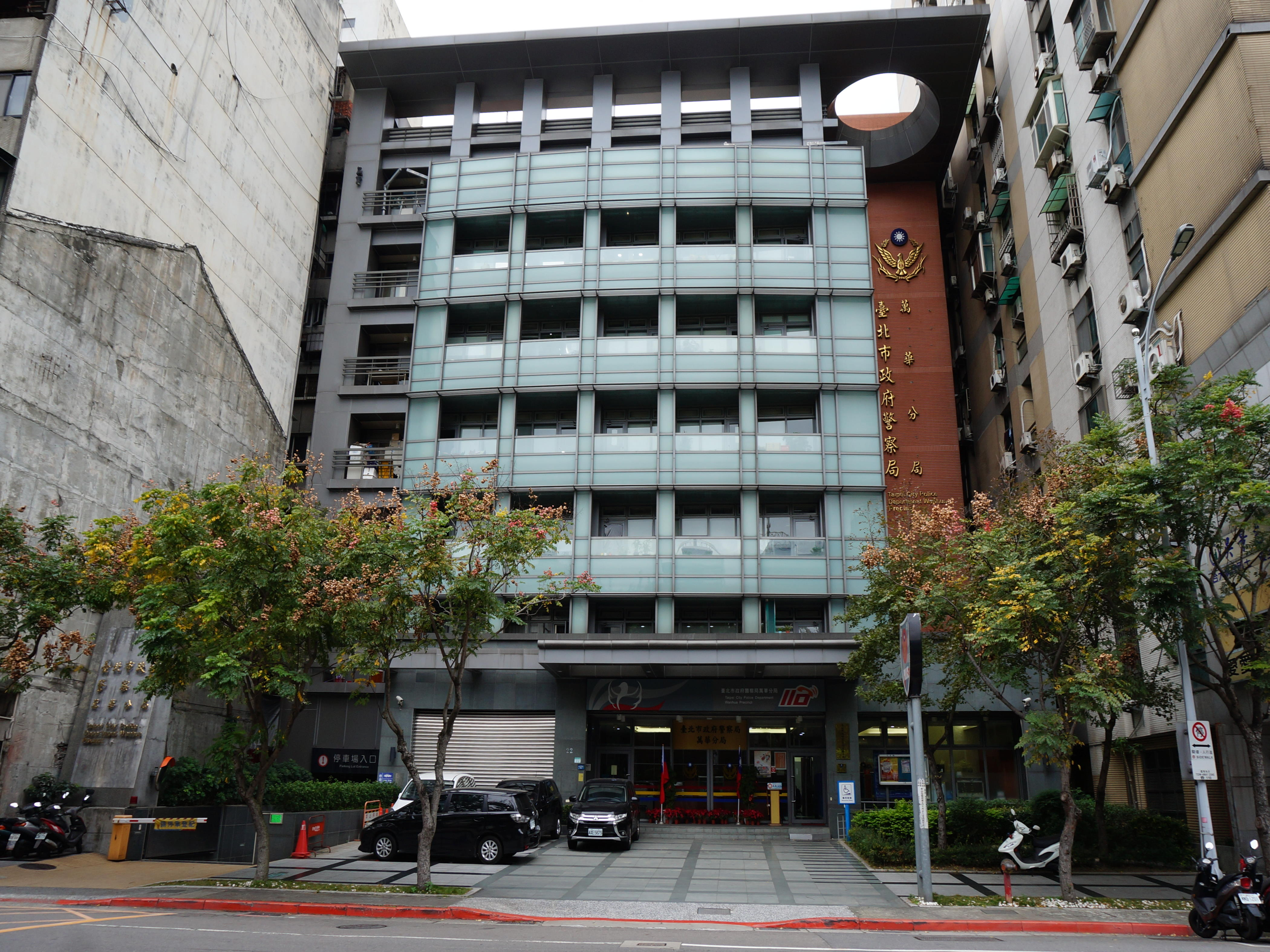 中文（台灣）: 臺北市政府警察局萬華分局，地址：臺北市萬華區康定路22號。